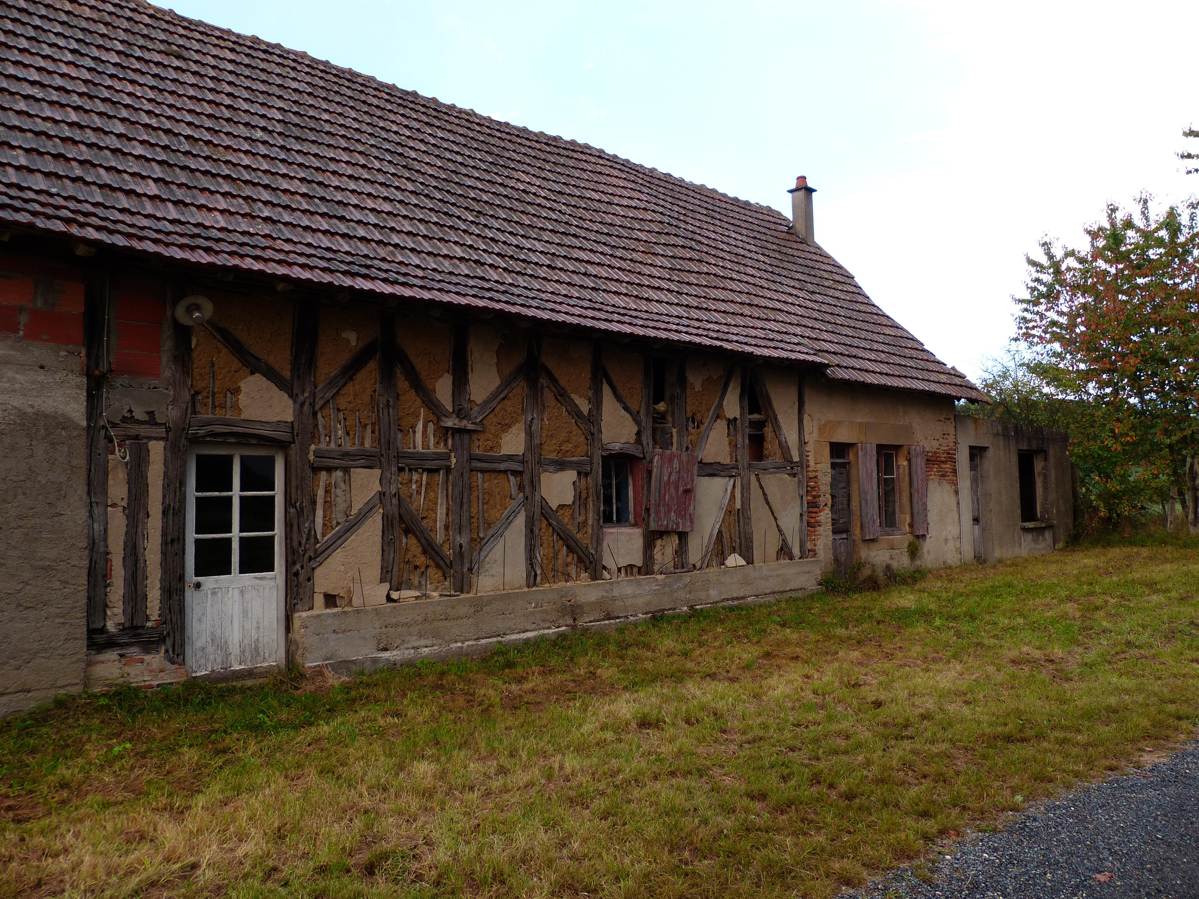 Neuglise (hameau et ancienne paroisse dépendant de la commune de Bessay-sur-Allier, Allier, France). Bâtiment de ferme à pans de bois à l'est de la maison classée Monument historique.